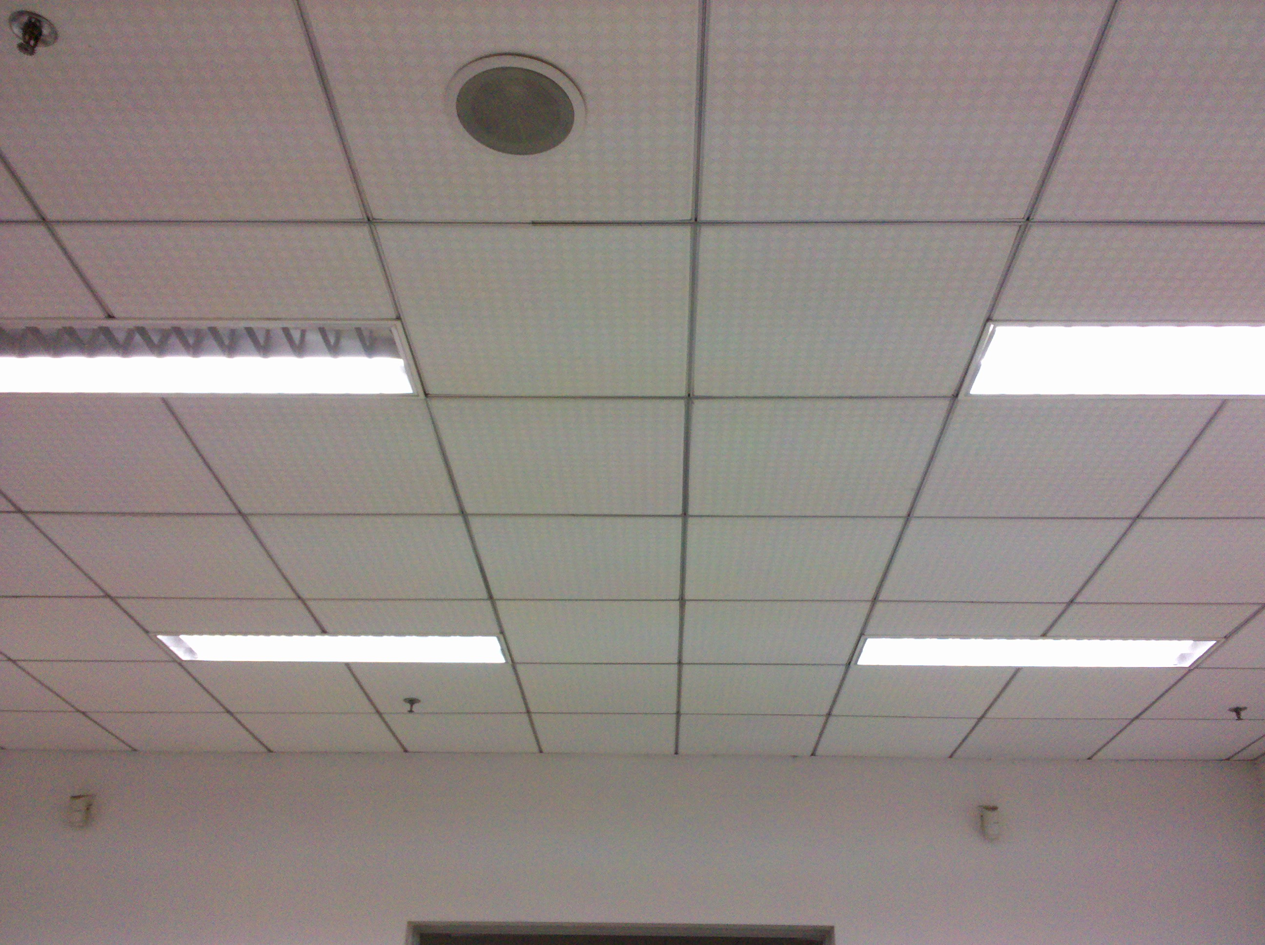 WNLO Lab Ceiling